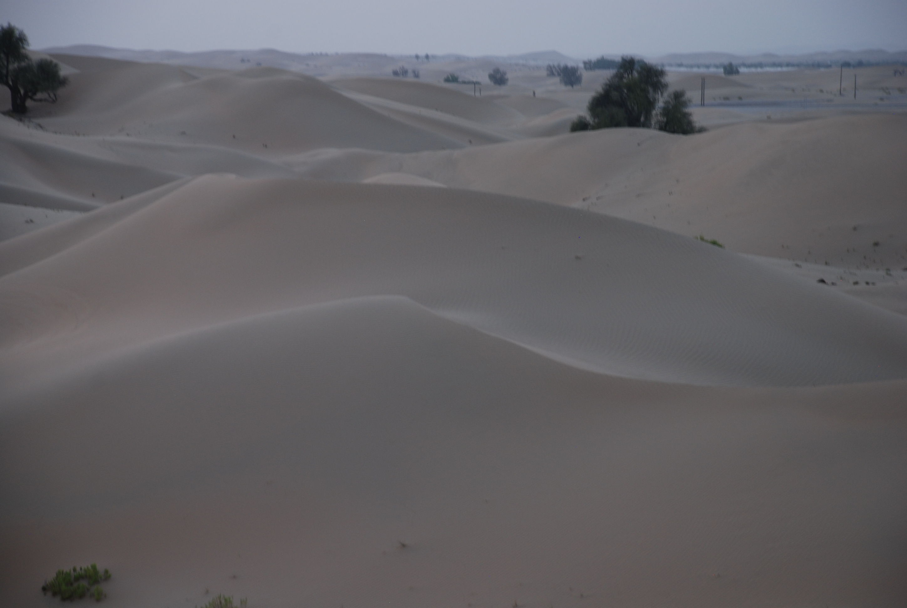 Abu Dhabi Desert